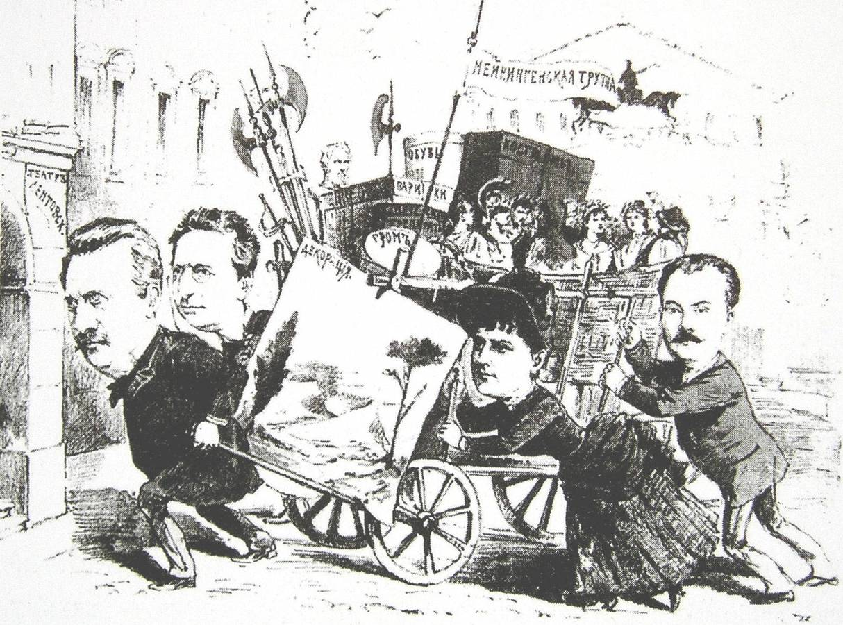 Die Meininger - Karikatur in einer russischen Zeitung während eines Gastspiels in Moskau